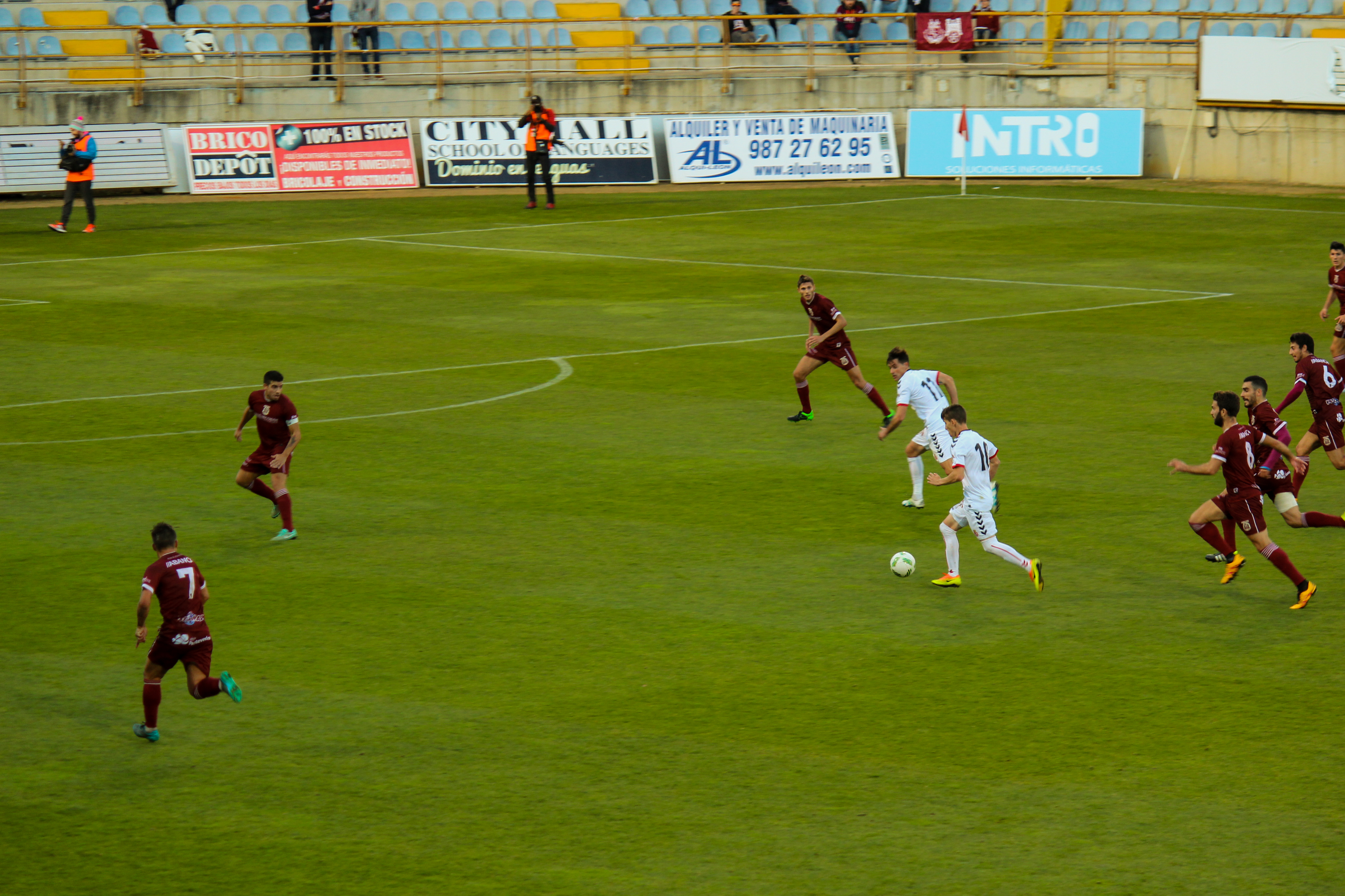 Partido de la cultural y deportiva leonesa contra el Pontevedra en el Reino de León.